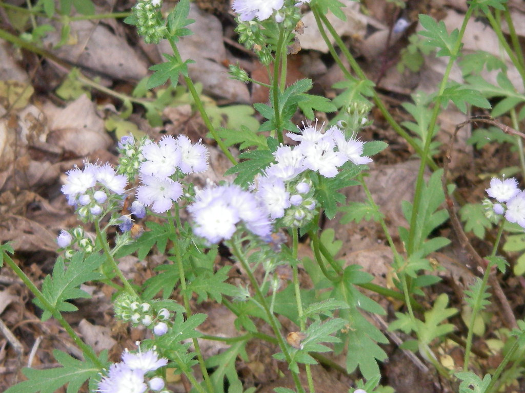 Phacelia purshii